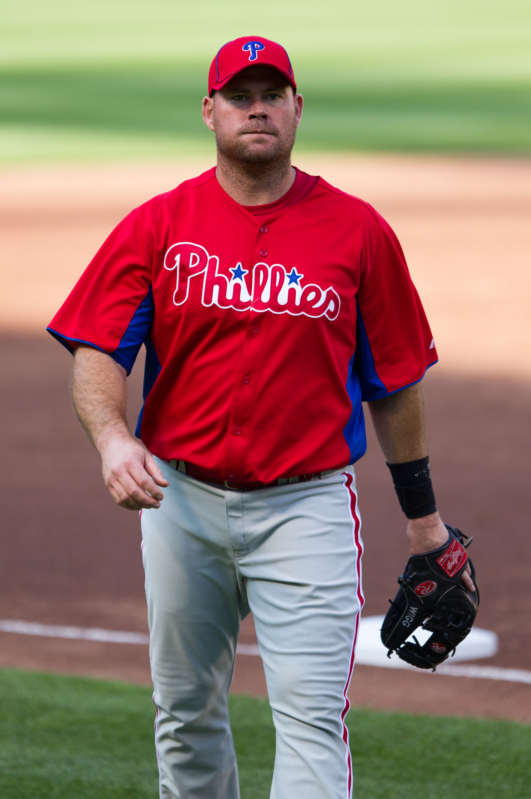 Ty Wigginton